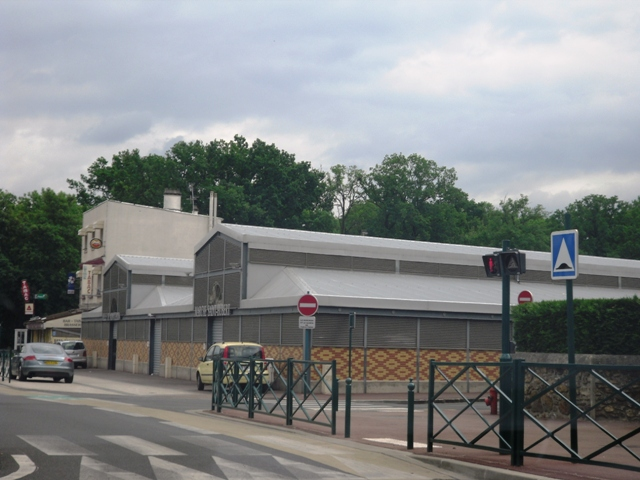 La halle du marché Saint-Hubert à Montgeron (91)